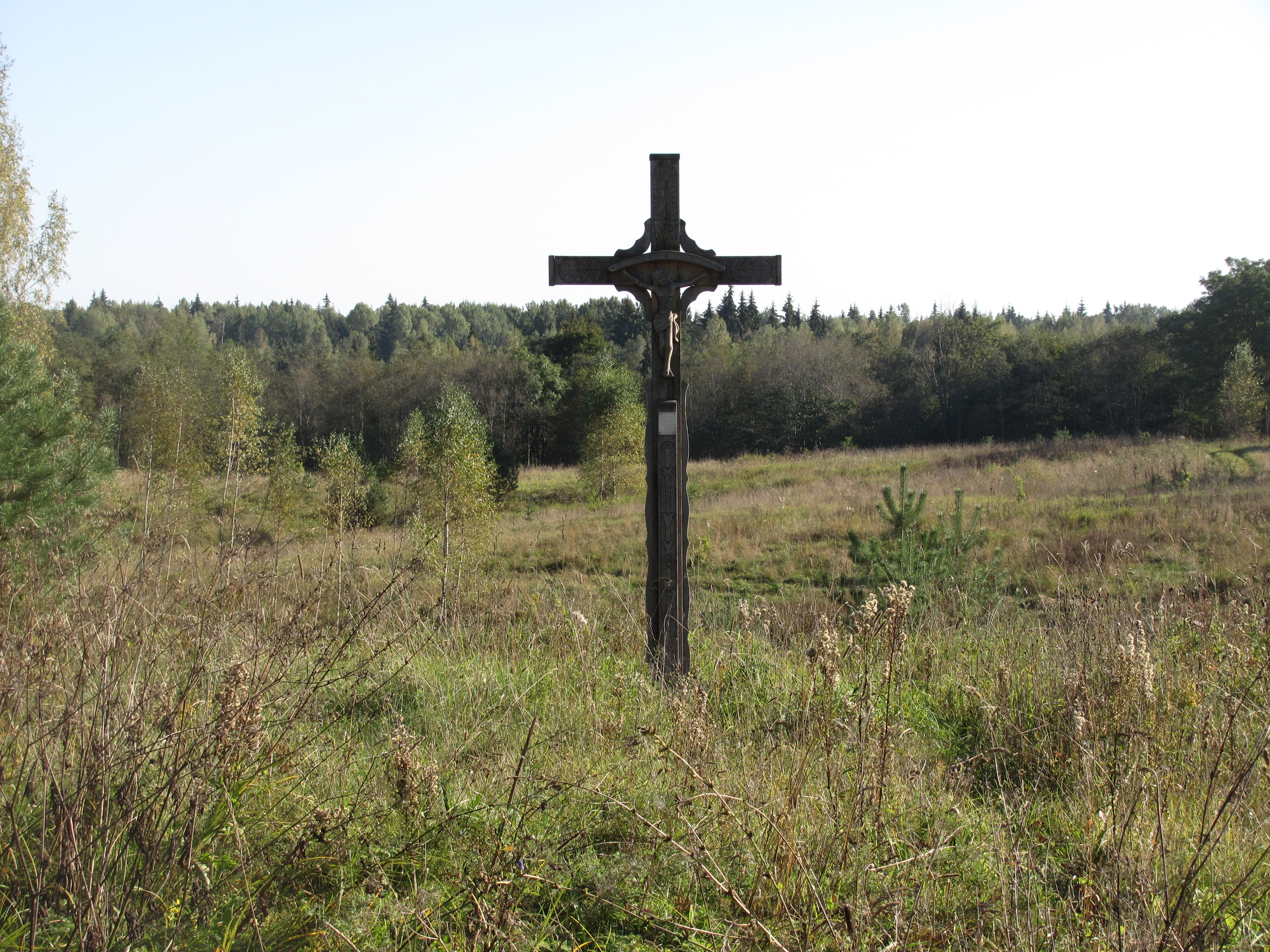 Tauragnų sen., Lithuania